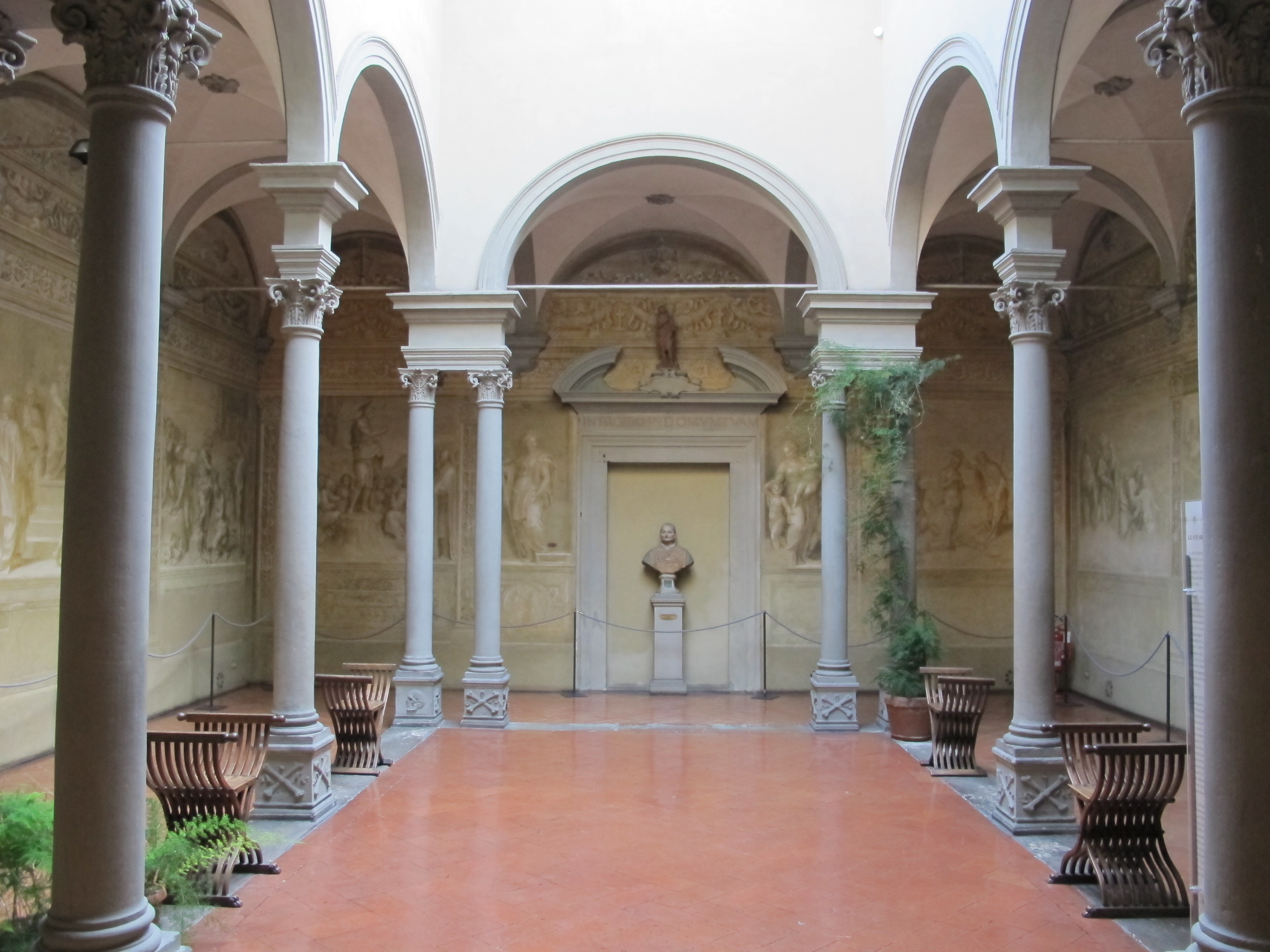 Chiostro dello Scalzo - MIBAC This is a photo of a monument which is part of cultural heritage of Italy.